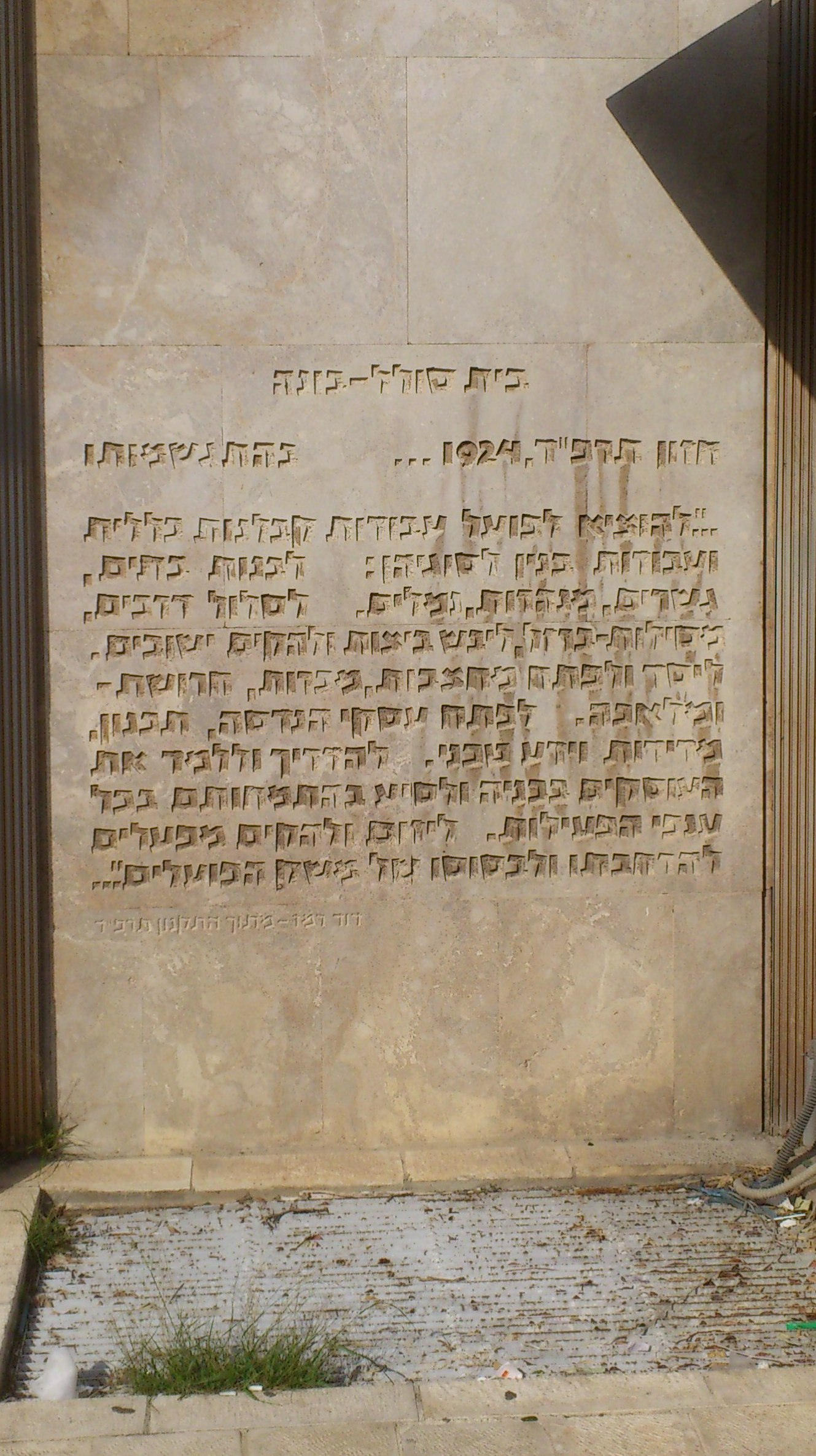 תחריטים על קירות בית סולל בונה בהדר העיר, חיפה חזון תרפ"ד, 1924... בהתגשמותו ..."להוציא לפועל עבודות קבלנות כללית ועבודות בנין לסוגיהן: לבנות בתים, גשרים, מנהרות, נמלים. לסלול דרכים, מסילות-ברזל, ליבש ביצות ולהקים ישובים. ליסד ולפתח מחצבות, מכרות, חרושת- ומלאכה. לפתח עסקי הנדסה, תכנון מדידות וידע טכני. להדריך וללמד את העוסקים בבניה ולסיע בהתמחותם בכל ענפי הפעילות. ליזום ולהקים מפעלים להרחבתו ולבסוסו של משך הפועלים"... דוד רמז-מתוך התקנון תרפ"ד